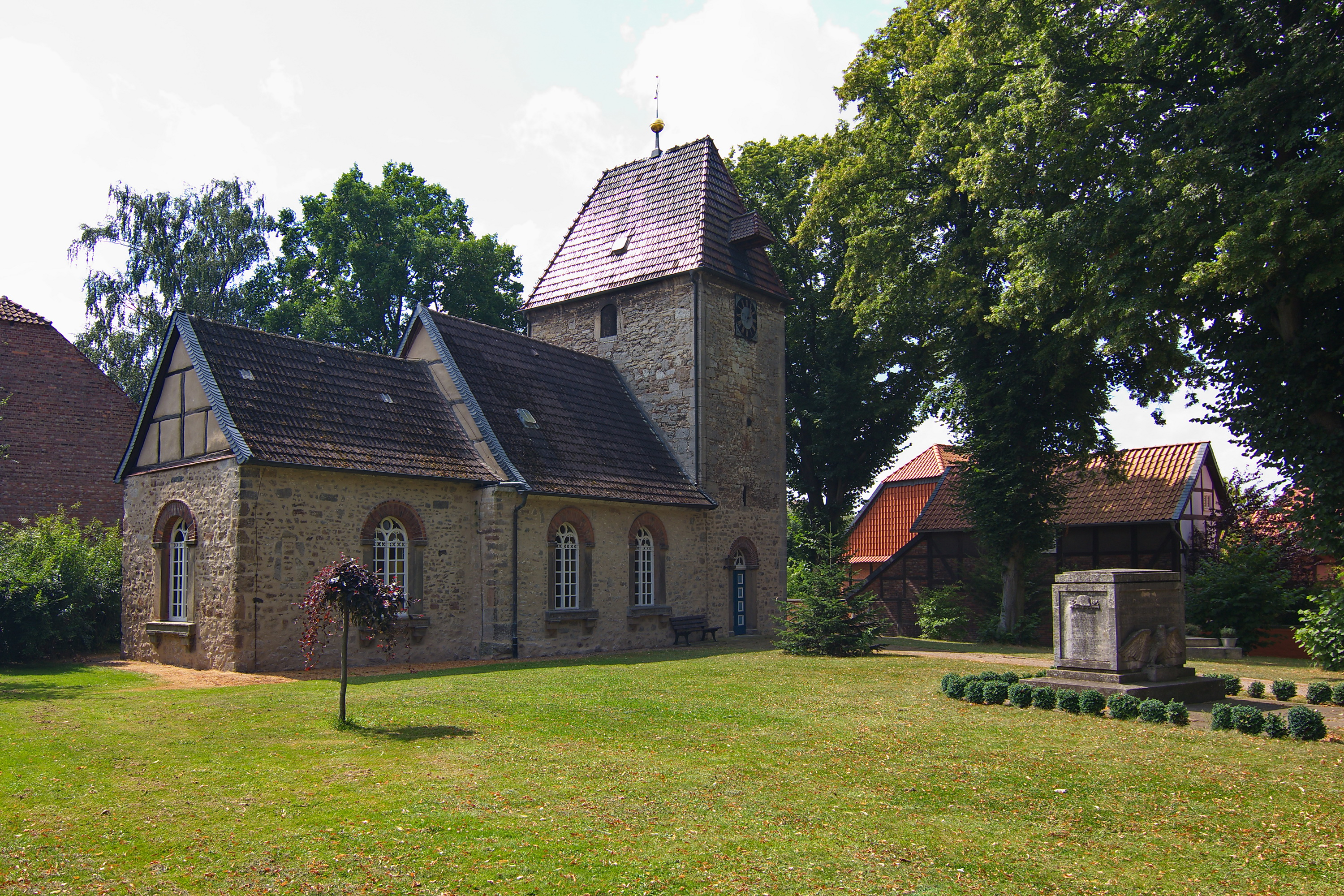 Die St.Urban-Kirche in Wierthe (Vechelde) wurde vermutlich im 13. Jhd errichtet.